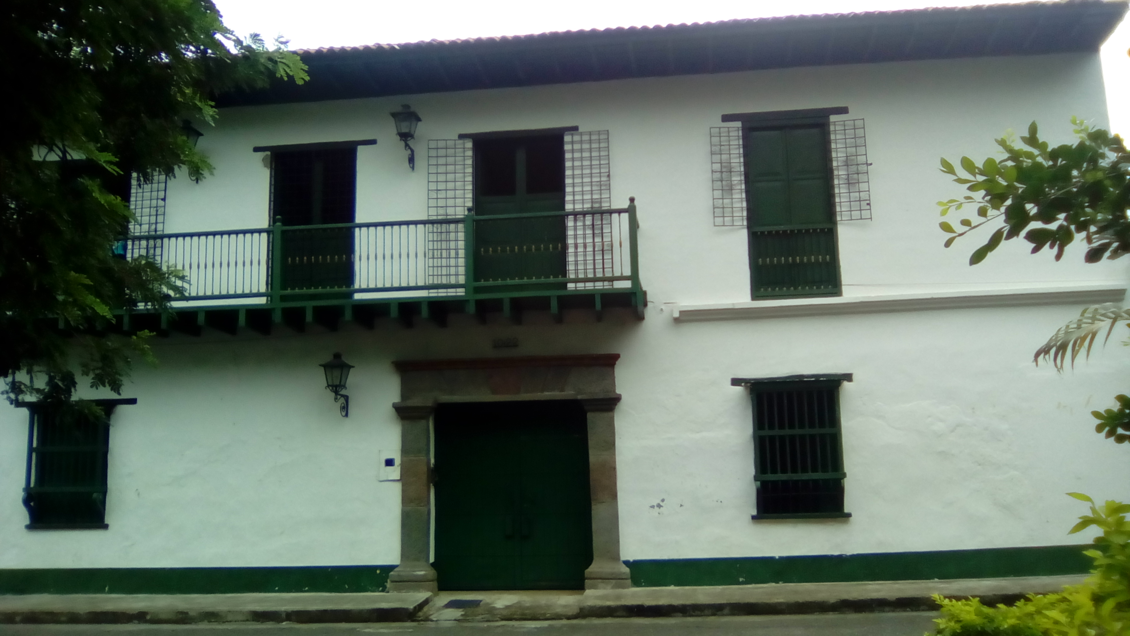 Casa junto a la plaza José León Armero en Honda, Tolima